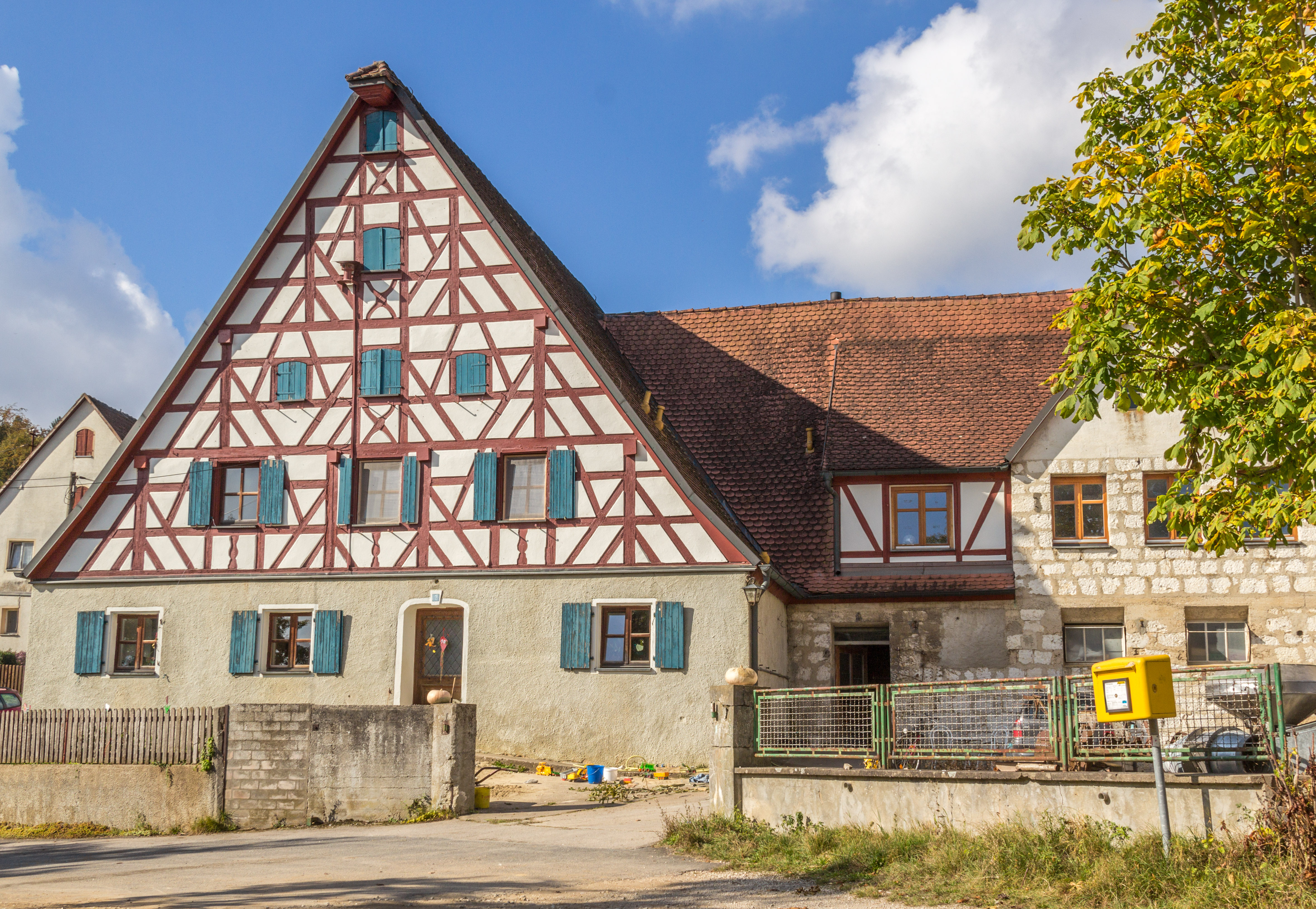 Hunas, Ehemaliges Wohnstallhaus, Massiver Steildachbau mit reichem Fachwerkgiebel, zweite Hälfte 18. Jahrhundert.